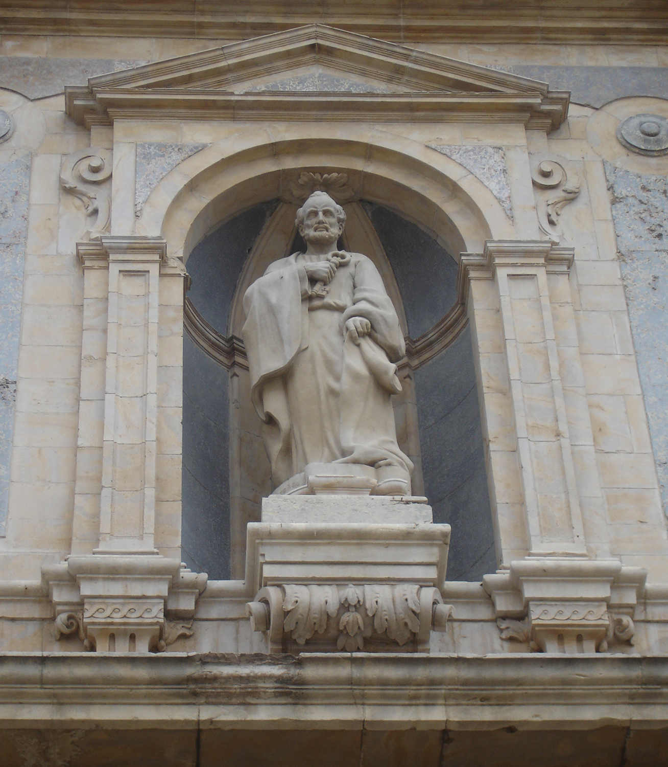 Catedral de Sant Pere de Vic (Vic, Osona, Catalunya, Espanya)